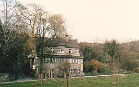 ehemaliges "Pförtner-Häusle" am Aufgang zum Stift Neuburg